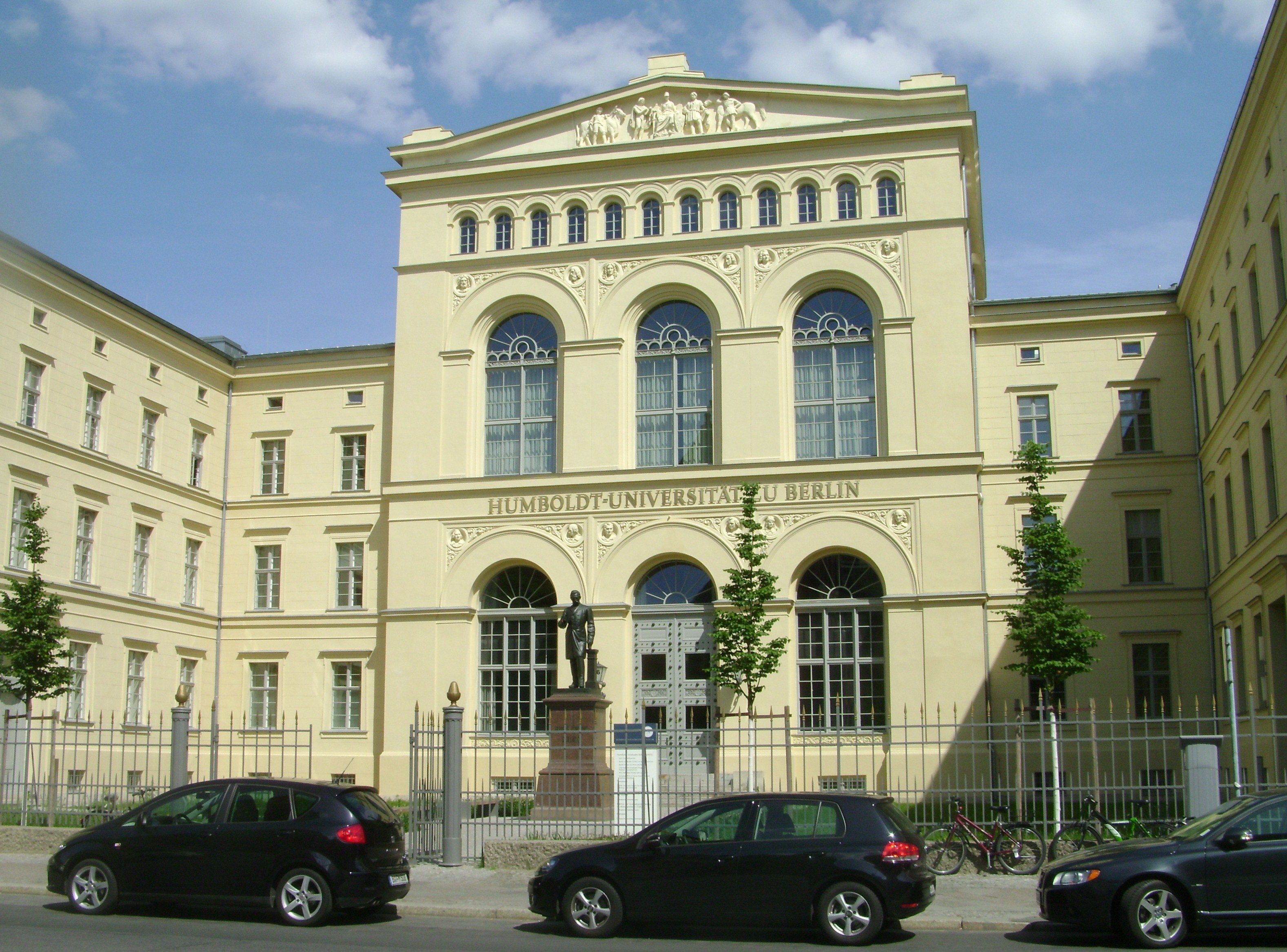 Ehrenhof und Lehrgebäude der ehemaligen Tierarzneischule Berlin, jetzt Humboldt-Universität mit Denkmal von Andreas Christian Gerlach, in Luisenstraße 56, erbaut 1839-1840 von Ludwig Ferdinand Hesse